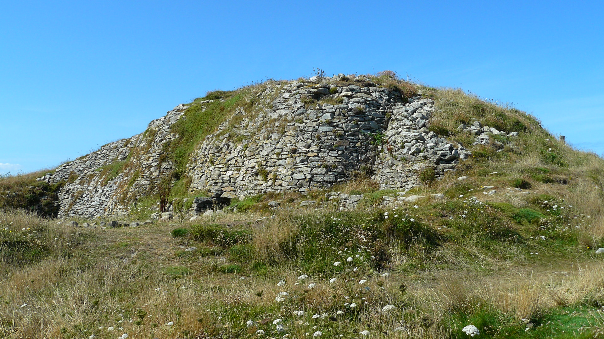 Façade du cairn primaire de l'île Carn, sur la commune de Ploudalmézeau, dans le Bas-Léon, en Finistère, en Bretagne. Vue du nord. Au premier plan, dans l'herbe, on devine plus ou moins le grand cercle (81 m) que dessine le haut du mur de parement du cairn secondaire. À droite, le massif avec contrefort qui prolonge au nord-est le cairn primaire. Au centre, la porte du dolmen nord.